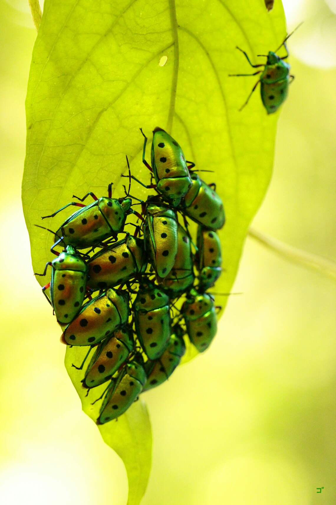 ナナホシキンカメムシ 群れ